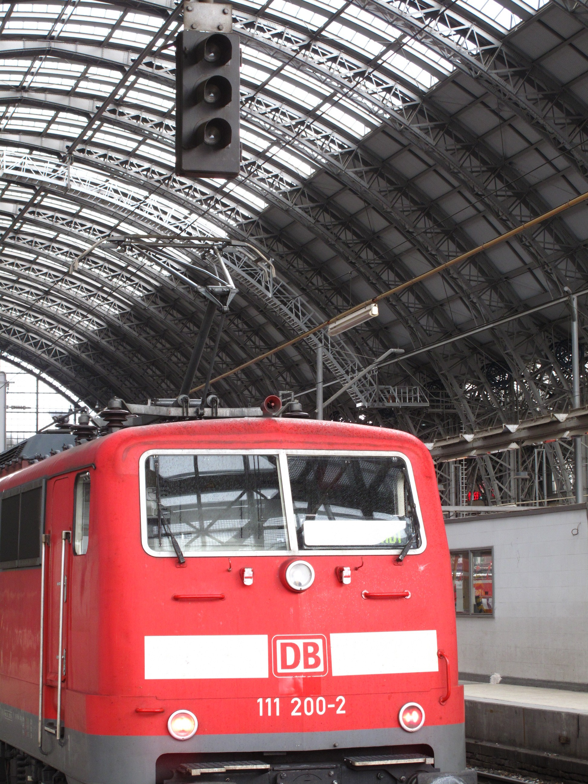 Signal für Bremsprobe in ausgeschaltetem Zustand vor der 111 200.